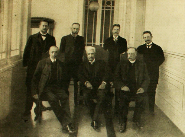 El nuevo ministerio de Pedro Montt. De pie de izquierda a derecha Anibal Rodriguez ministro de Guerra y Marina, Eduardo Suarez M. Justicia e Instrucción, Pedro Montenegro de Hacienda, Guillermo Echavarría de Industria y Obras Públicas. Sentados Javier Figueroa del Interior, Presidente Montt, Rafael Balmaceda de Relaciones Exteriores.